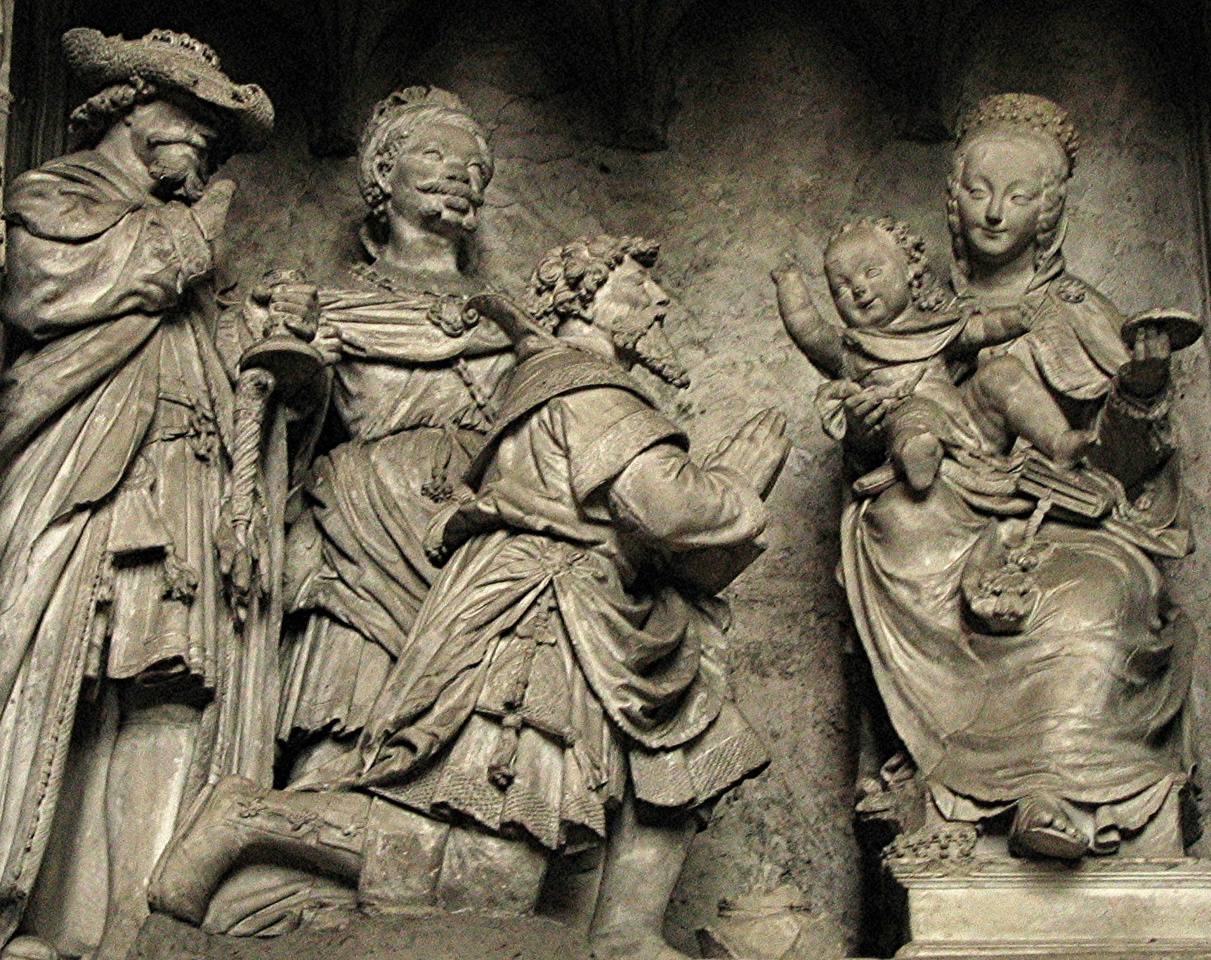 Clôture du choeur de la cathédrale de Chartres ; sculpture de Jehan Soulas, XVIe siècle : scène n°12, Adoration des Mages.